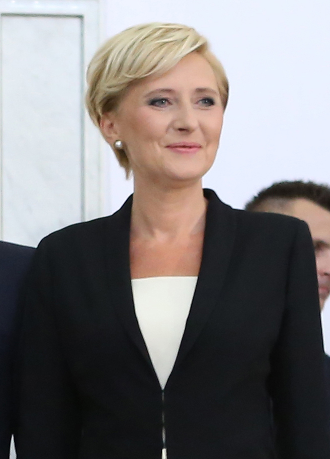 Agata Kornhauser-Duda w gmachu Sejmu po zakończeniu obrad Zgromadzenia Narodowego zwołanego w celu odebrania przysięgi od nowo wybranego prezydenta